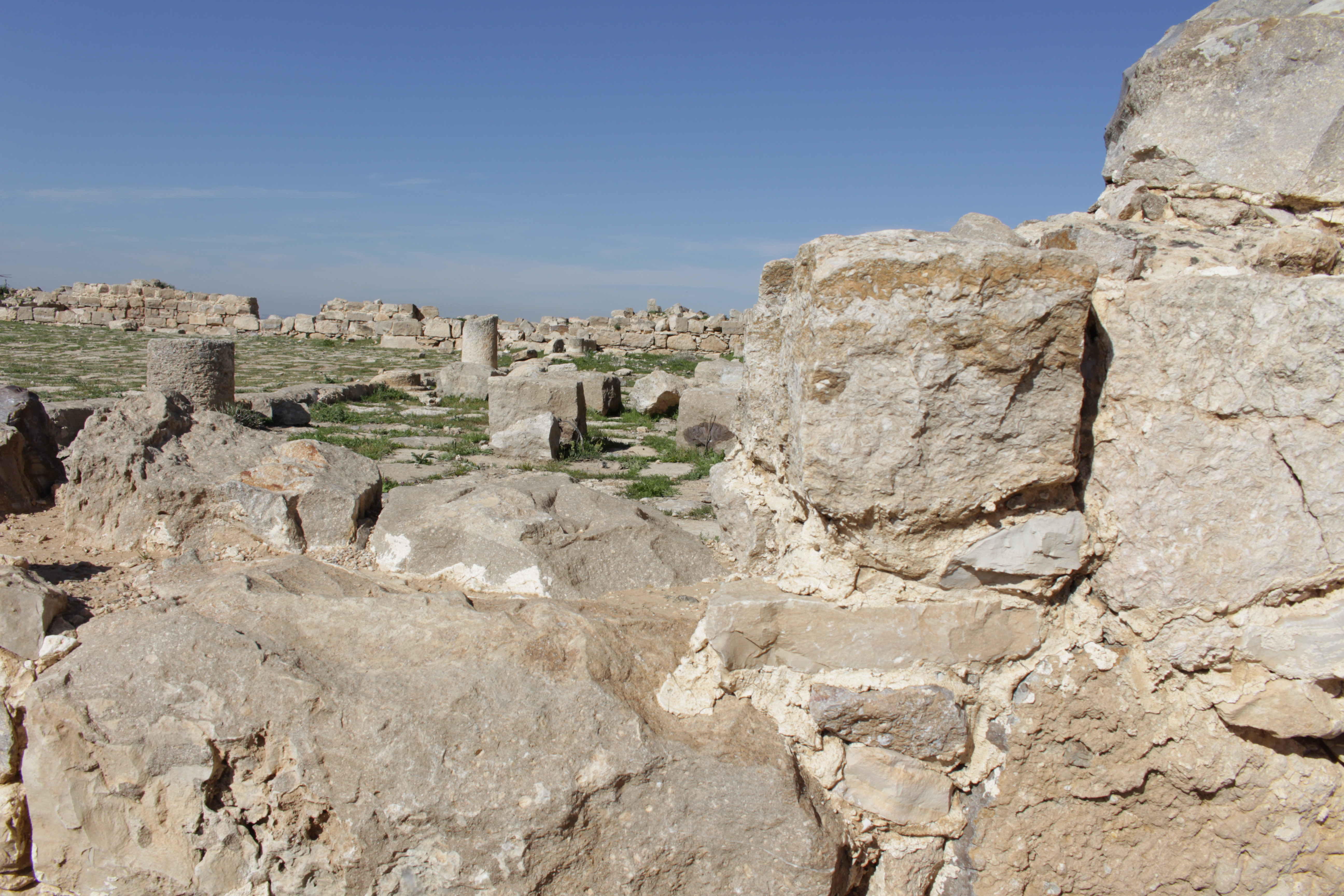 قصر ام الوليد